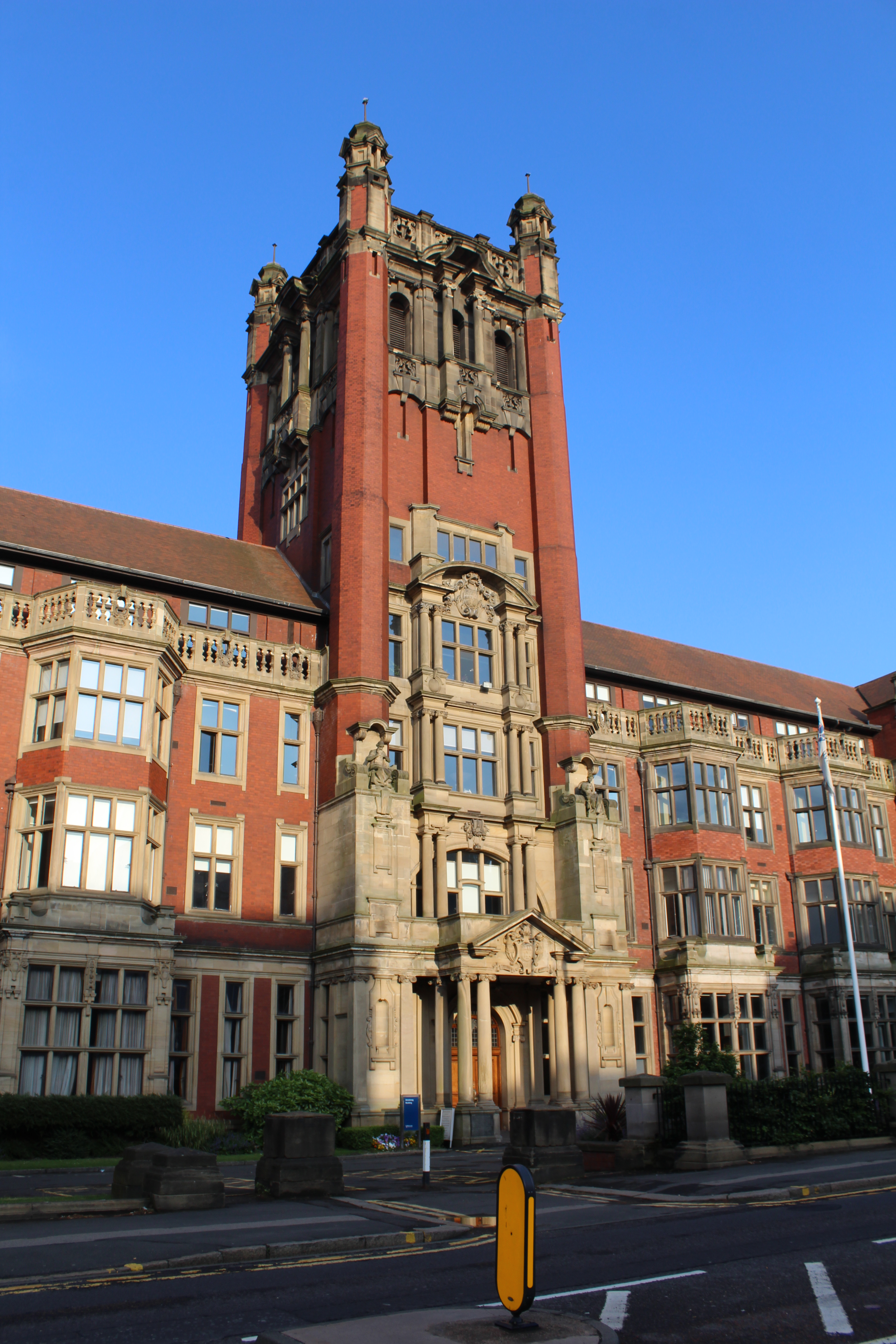 Bâtiment Armstrong, Newcastle upon Tyne.